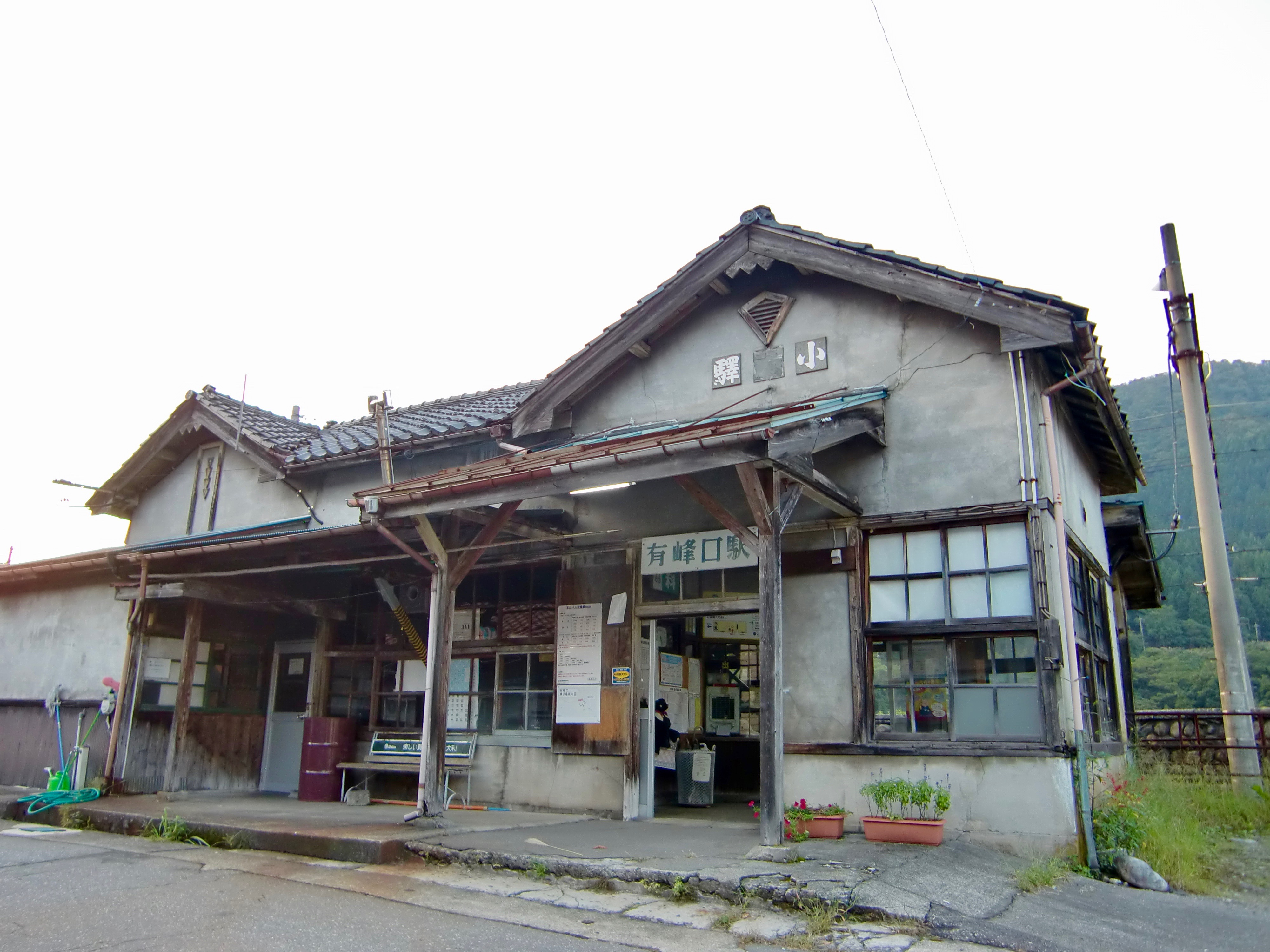 富山地方鉄道立山線有峰口駅